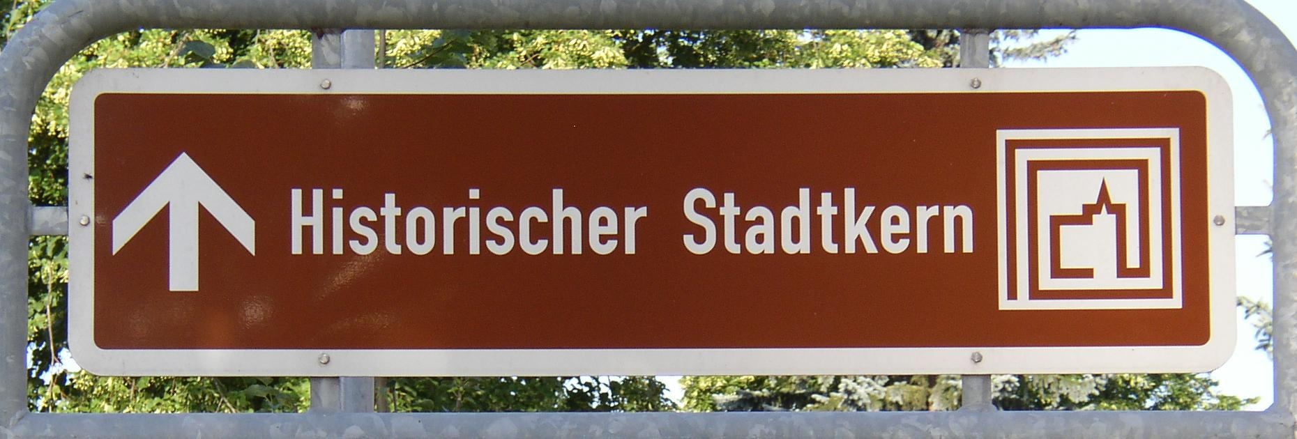 Hinweistafel „Historischer Stadtkern“ in Kremmen in Brandenburg, Deutschland